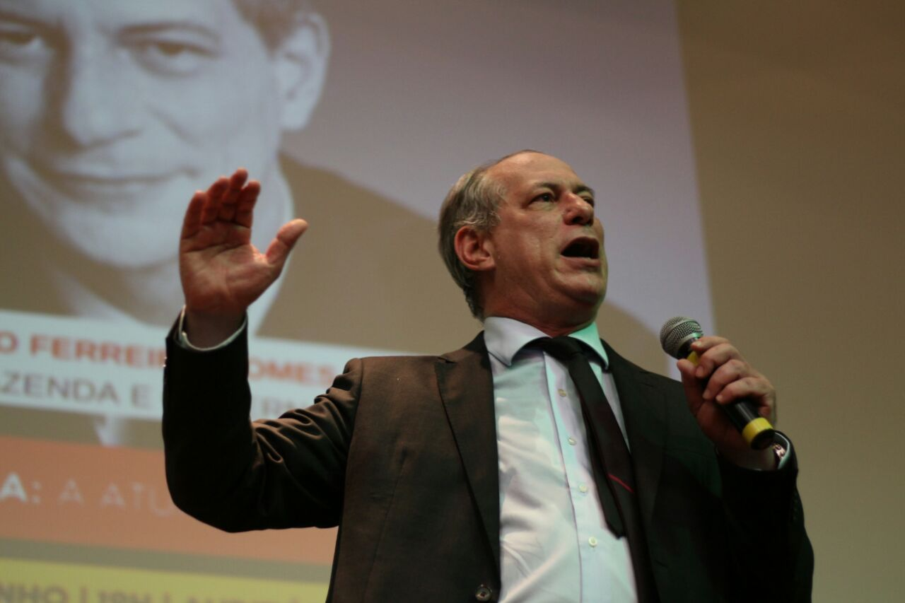 Ciro Gomes na abertura da II Semana de Políticas Públicas da UFABC, organizada pelo Centro Acadêmico de Políticas Públicas (CAPOL) e alunos do curso. Foto: Murilo Silva/CAPOL.